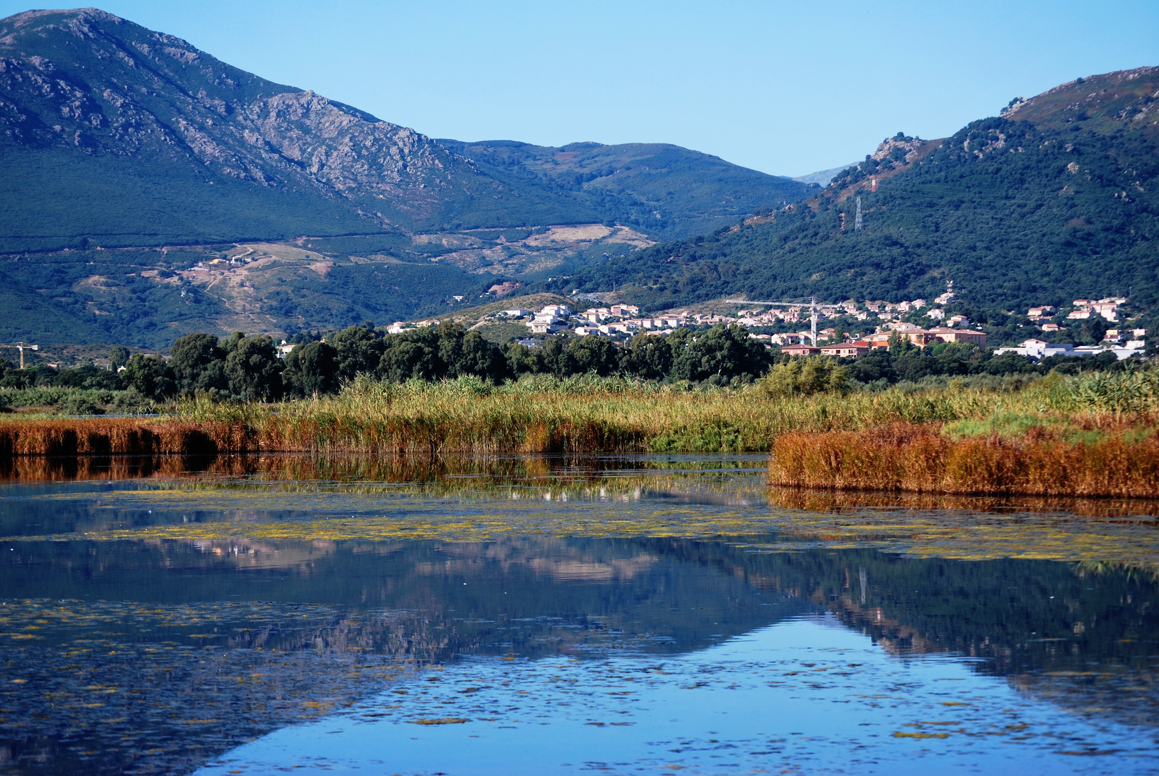 Réserve naturelle de l'étang de Biguglia